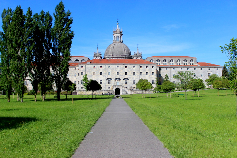 Loiolako Santutegia (Azpeitia)